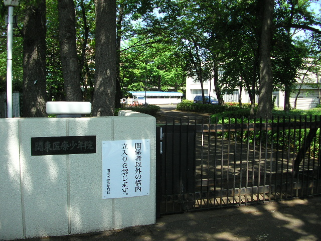 関東医療少年院の通用門。